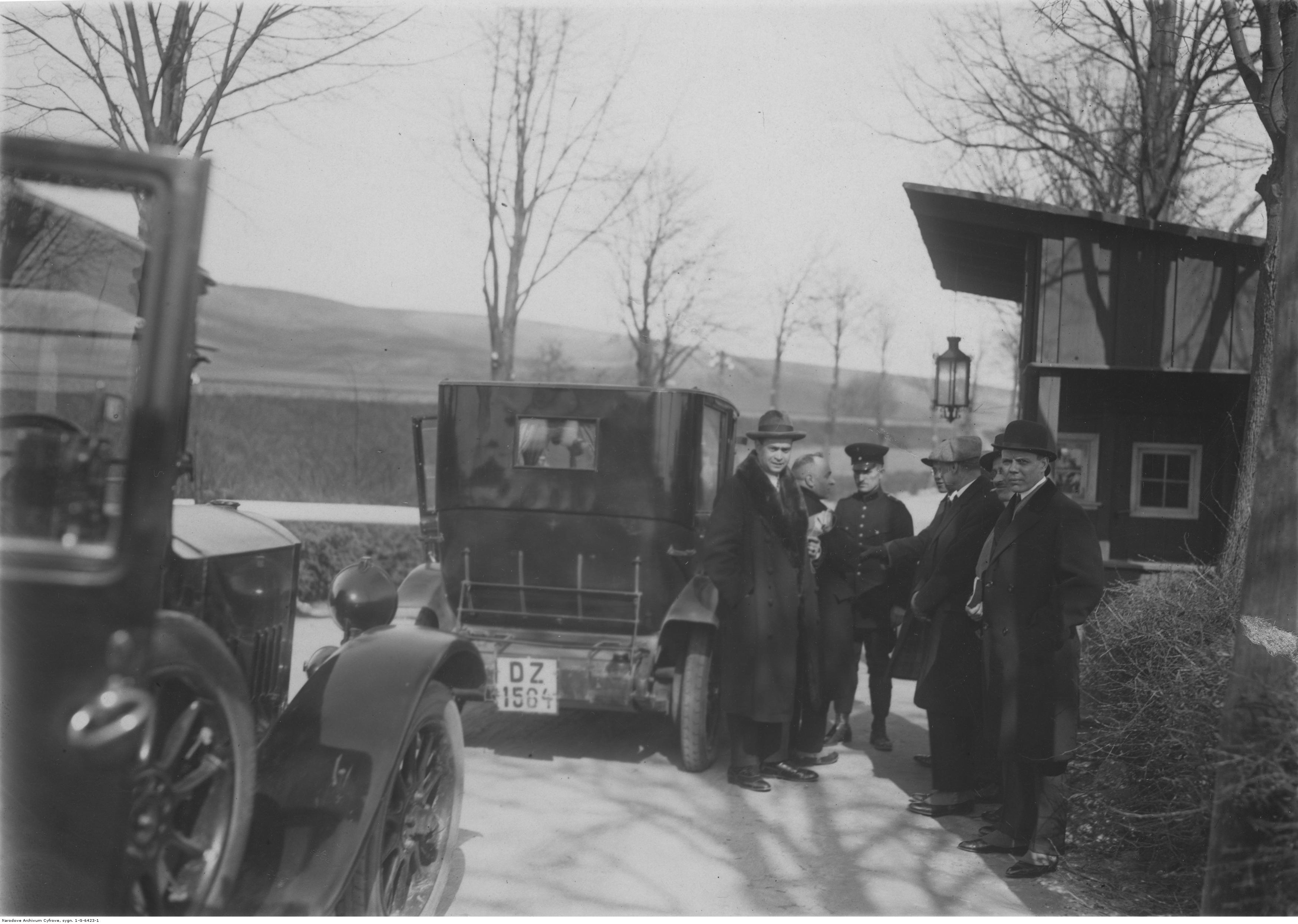 Posterunek Straży Granicznej w Kolibkach (granica Polski i Wolnego Miasta Gdańska). Koncern Ilustrowany Kurier Codzienny - Archiwum Ilustracji. Sygnatura: 1-G-6423-1